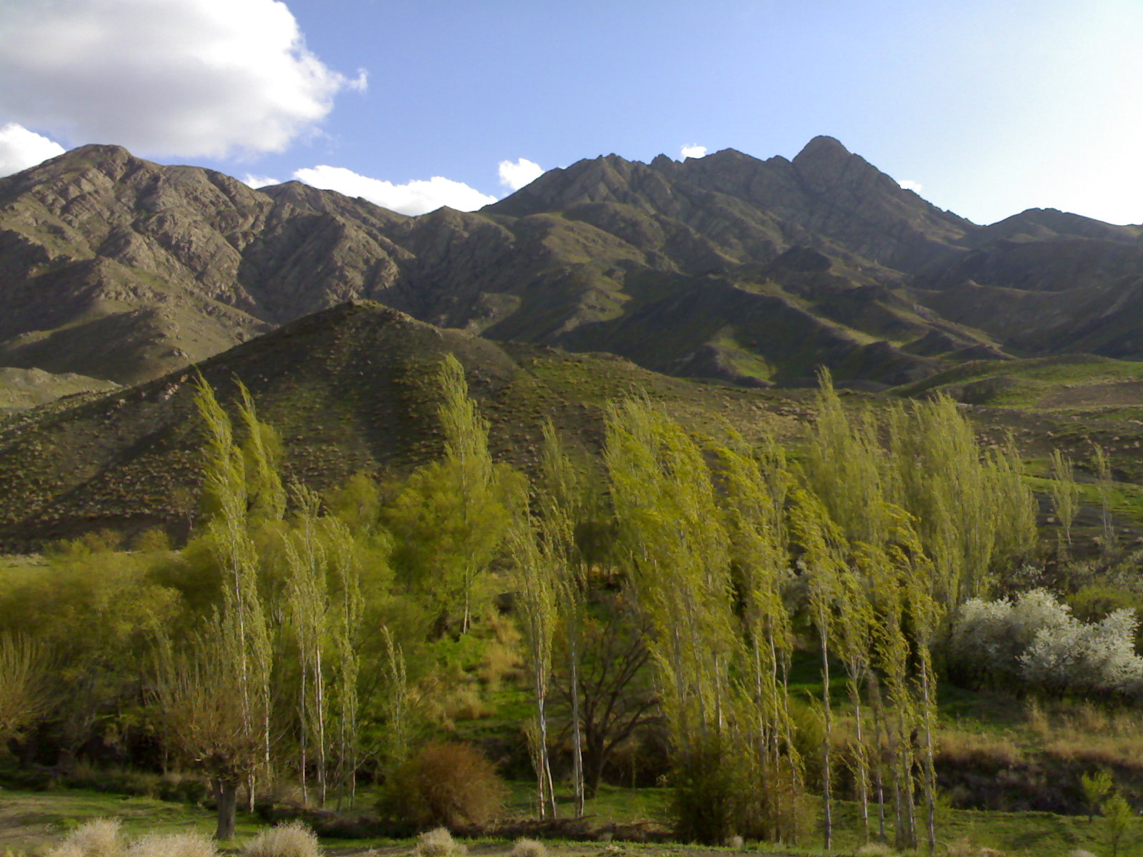 بیشه ی ساق در فصل بهار